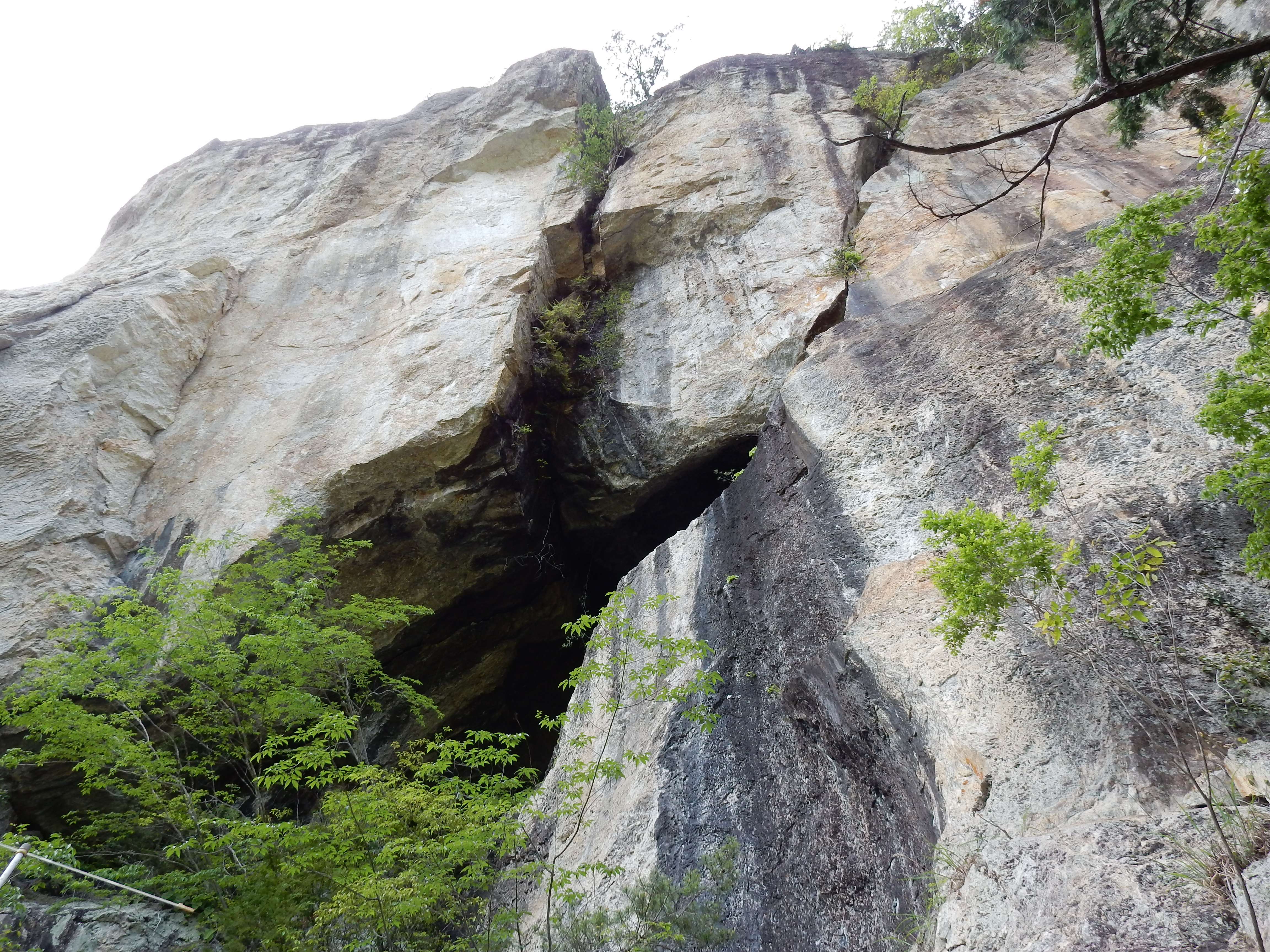 国指定名勝天然記念物（地質・鉱物）。乳岩と乳岩峡